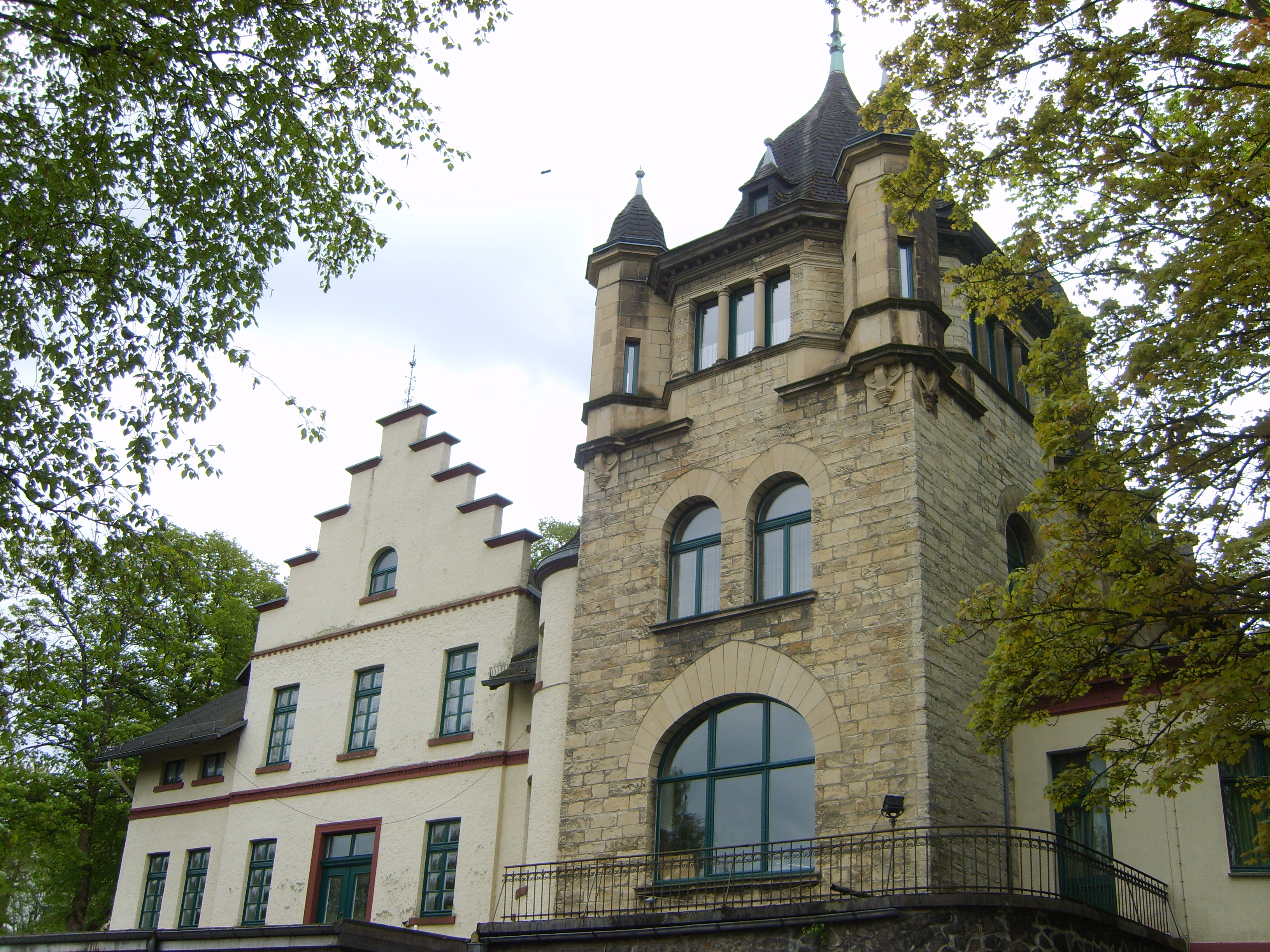 Haus Dassel in Warstein-Allagen. Denkmalschutz seit 27. November 1984.